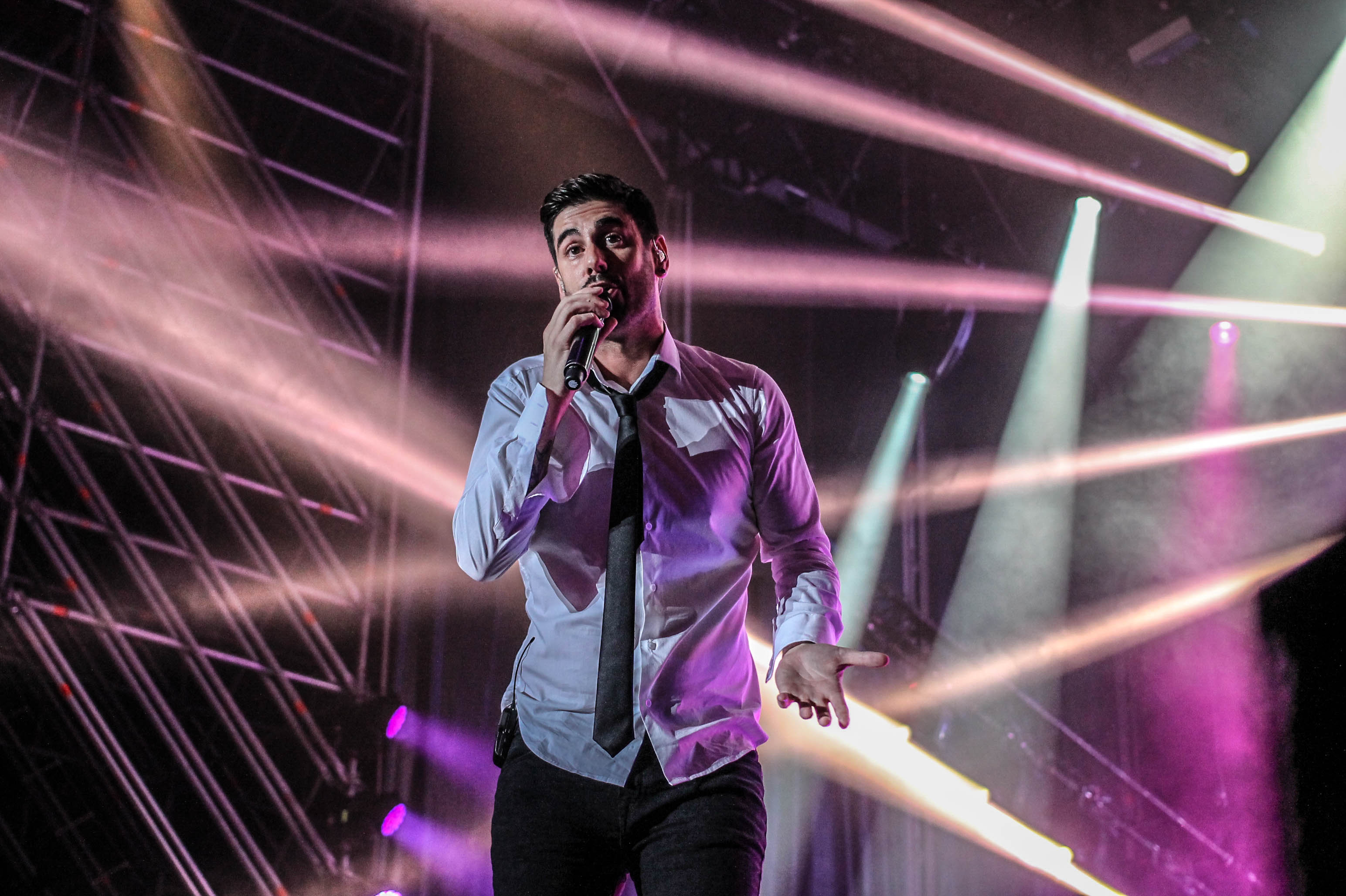 Melendi en el incio de gira 2015 Un alumno más en Valladolid